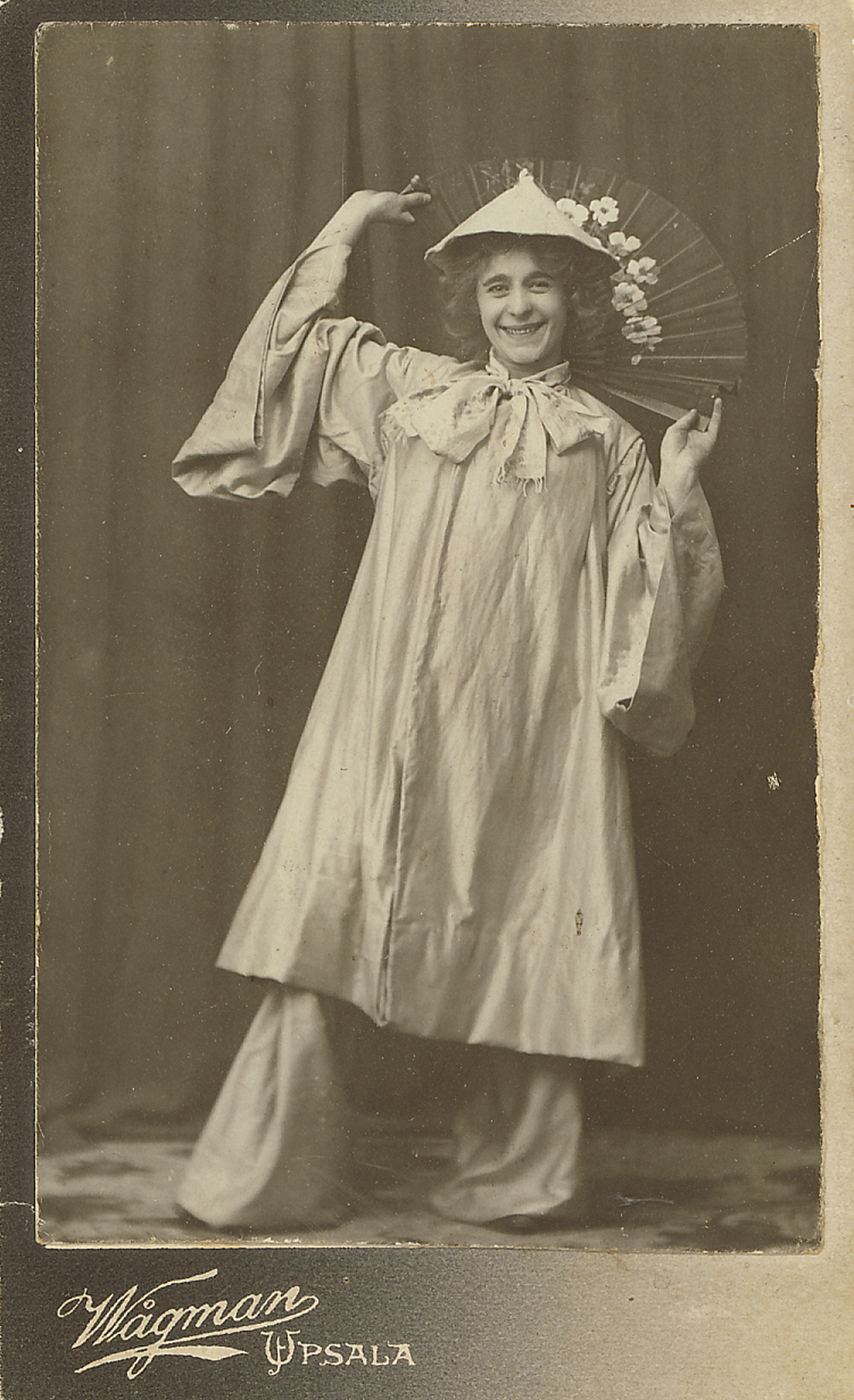 Ester Julin fotograferad av Sigrid Wågman, fotograf från Uppsala (1869–1934).